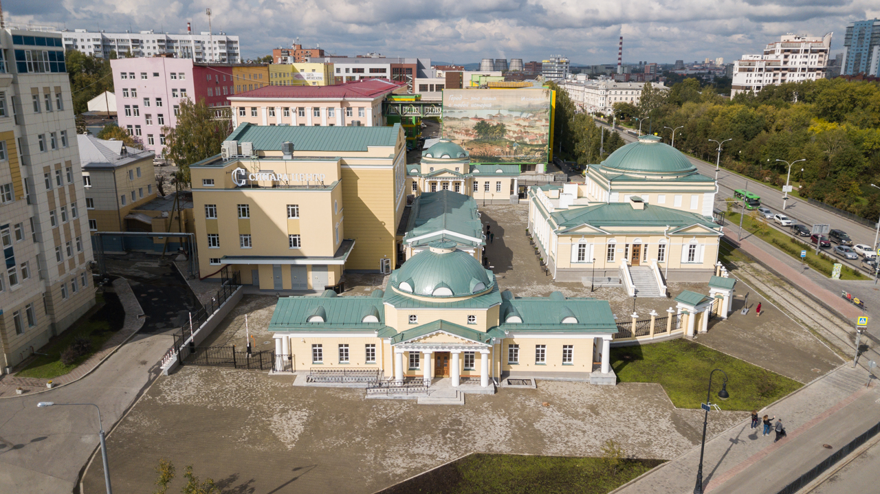 Госпиталь Верх-Исетского завода после реконструкции. В настоящее время культурно-выставочный комплекс "Синара Центр"